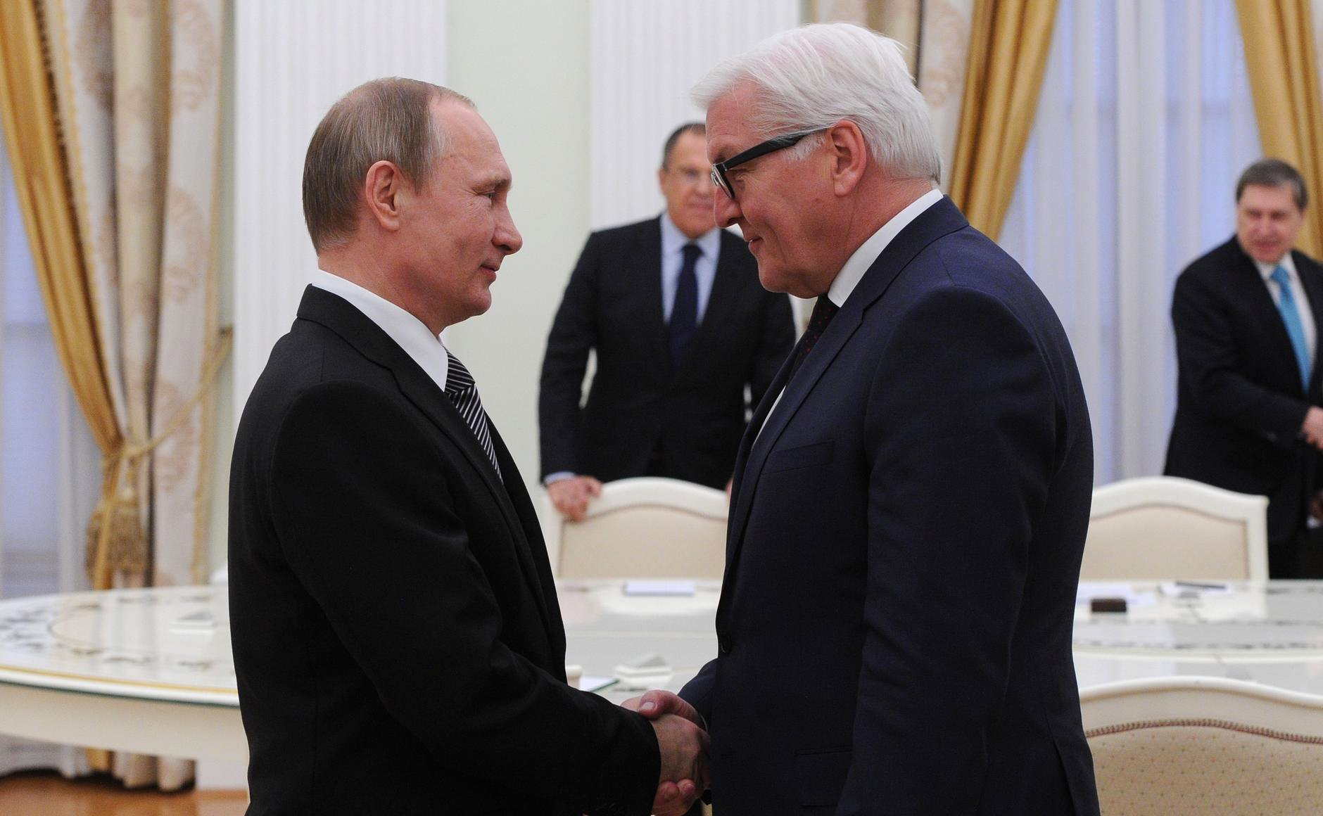 Встреча Президента России Владимира Путина с Министром иностранных дел Германии Франком-Вальтером Штайнмайером